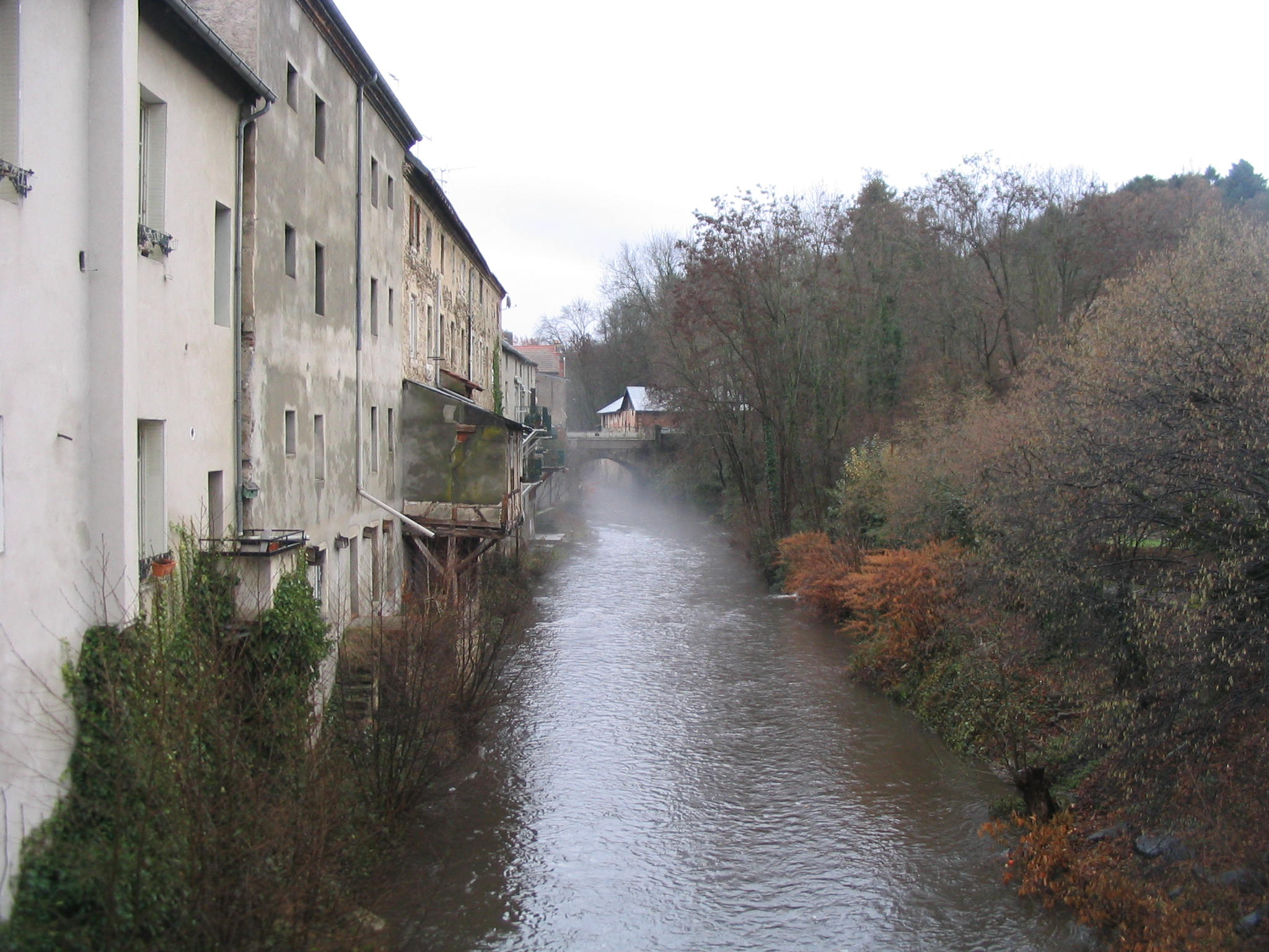 Le Sichon à Cusset. Affluent de l'Allier.